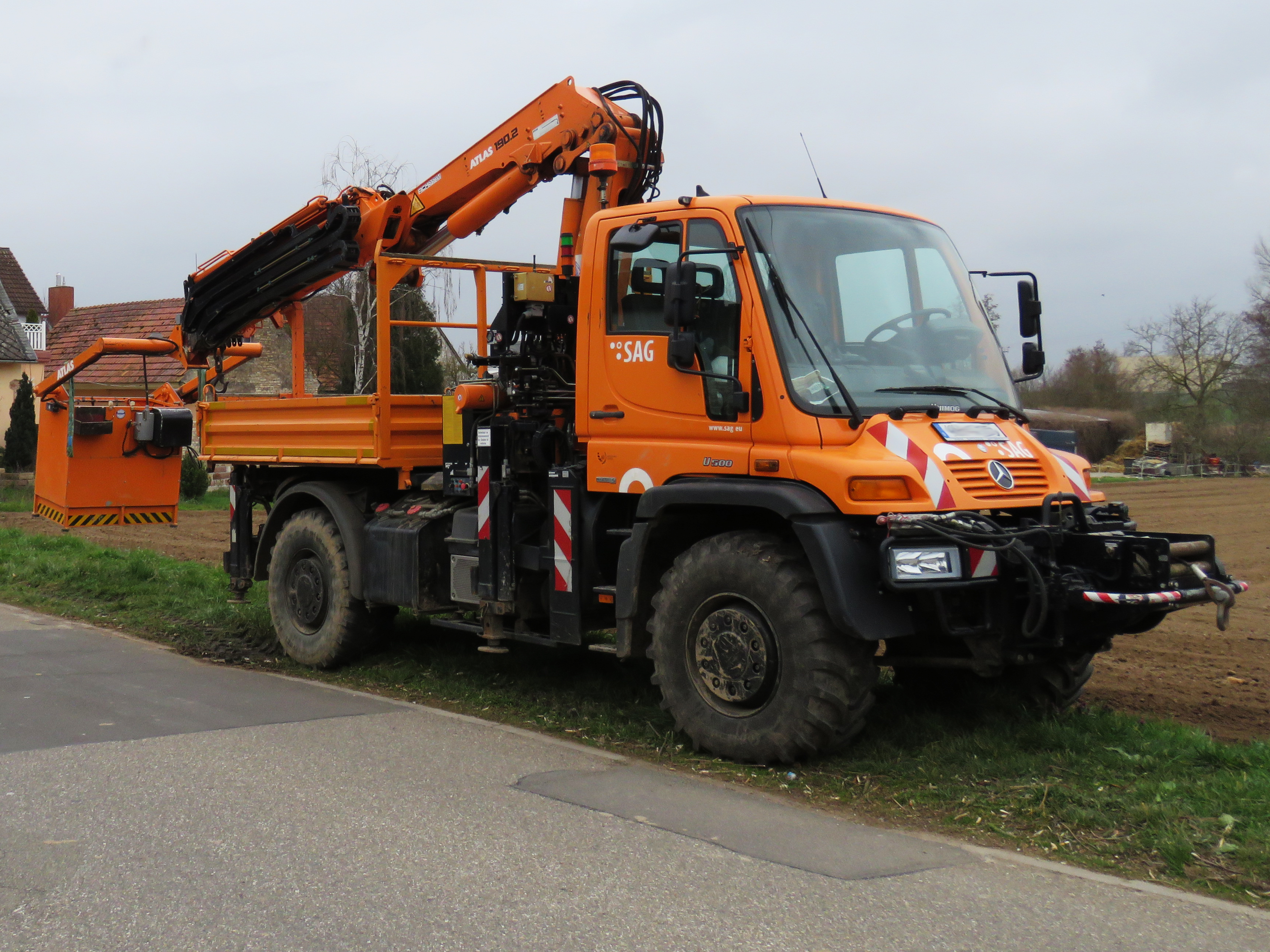 Modellauto - Vorbild - Unimog mit Hebebühne - 3 Orange Unimog 405/UGN bucket truck of SAG GmbH in Germany